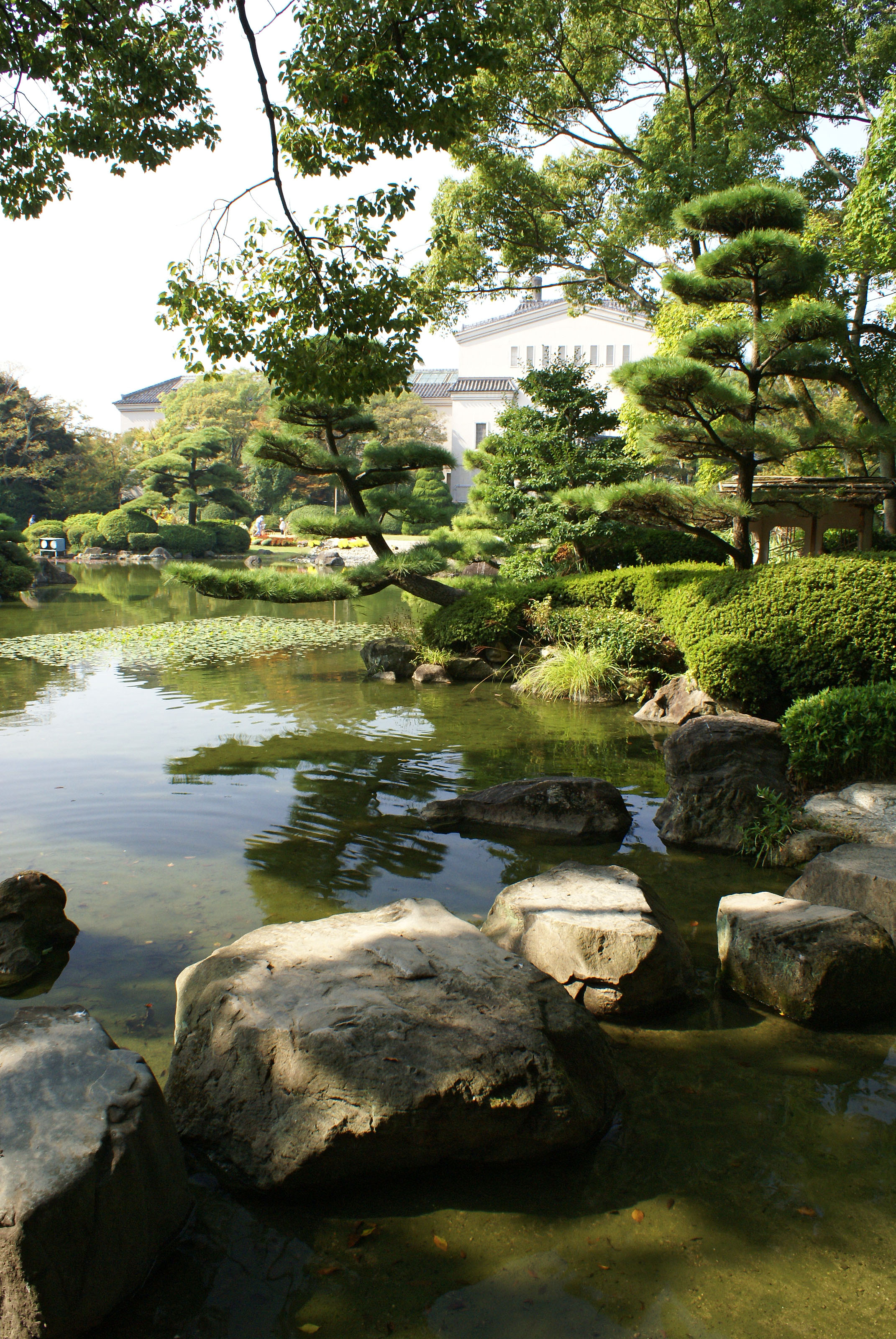 Keitakuen in Osaka, Japan